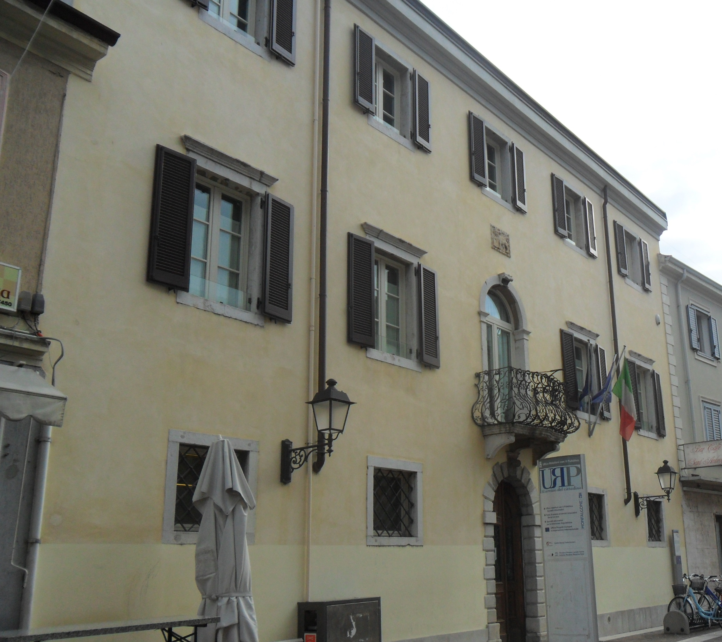 Facciata del cosiddetto "palazzetto veneto" sito in via S. Ambrogio a Monfalcone